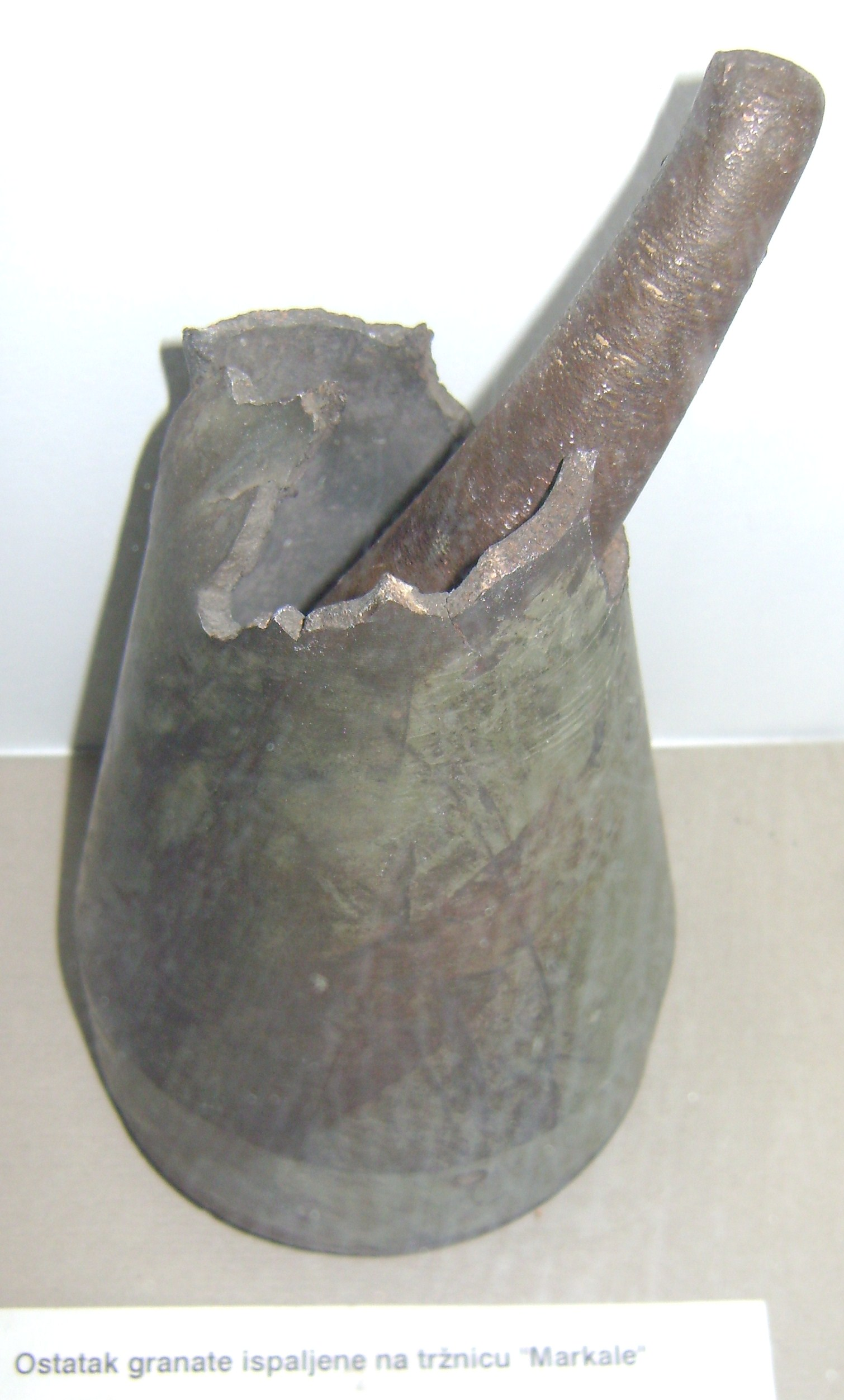 Reste der Markale-Granate